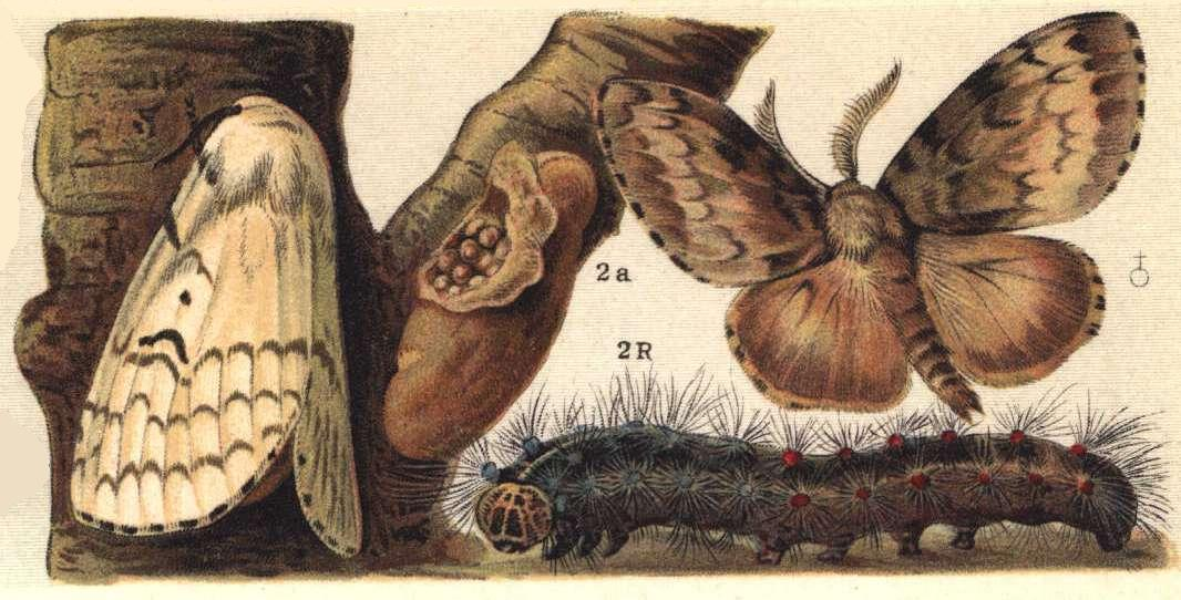 Gypsy moth (Lymantria dispar)